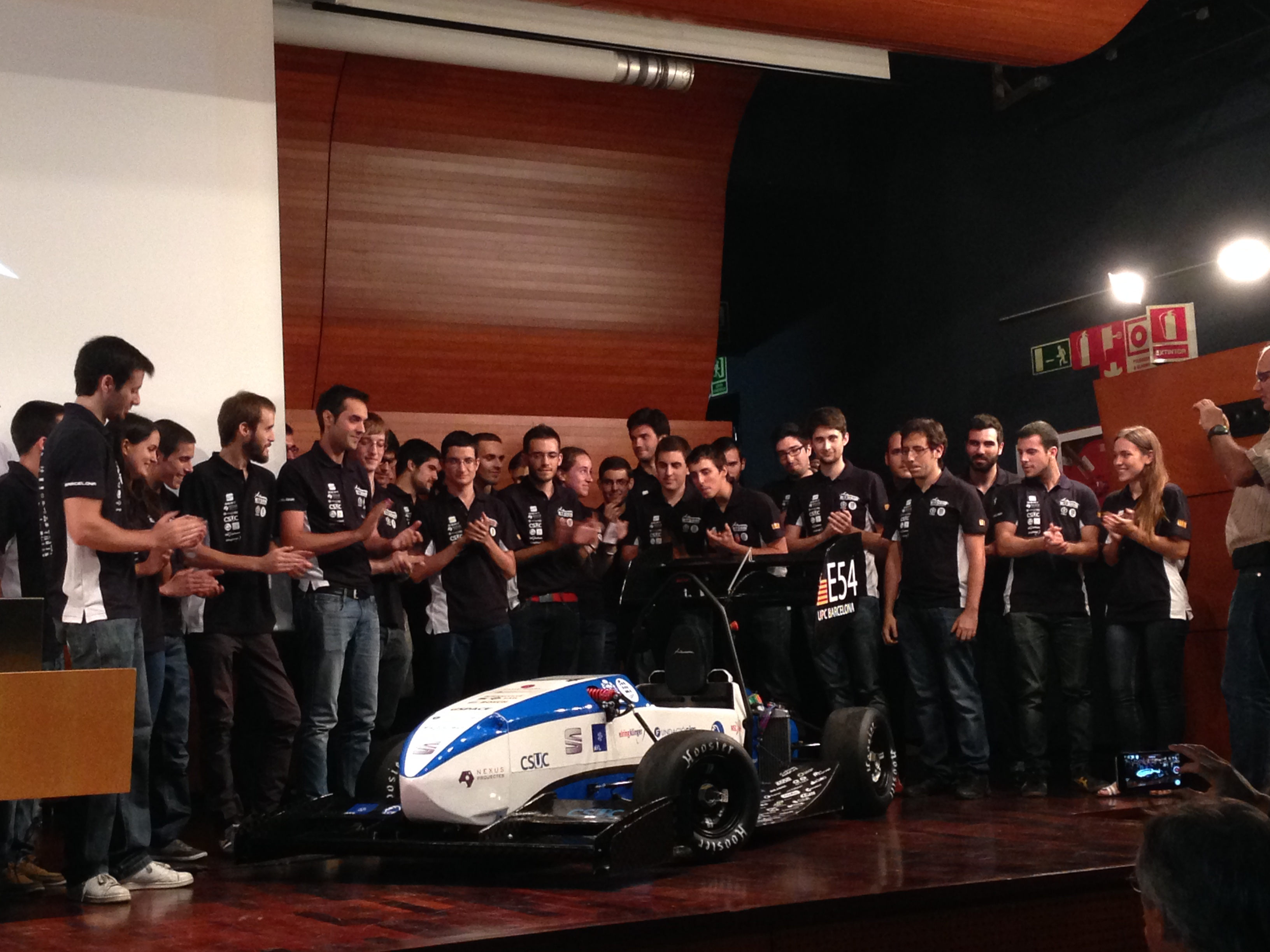 Foto tomada en la presentación del coche CAT08e en la sala de actos de la universidad ETSEIB